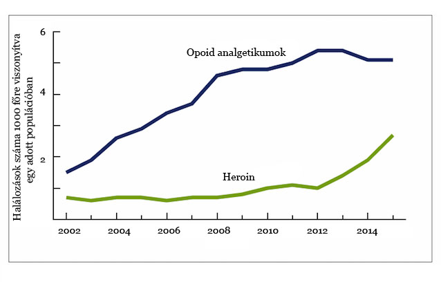 Stat. heroin/ opoidok